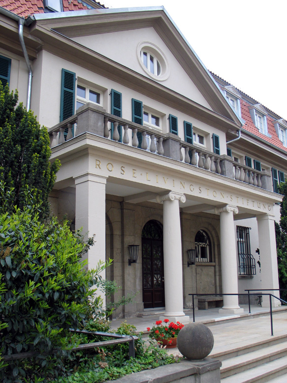 Frontansicht Nellinistift Frankfurt